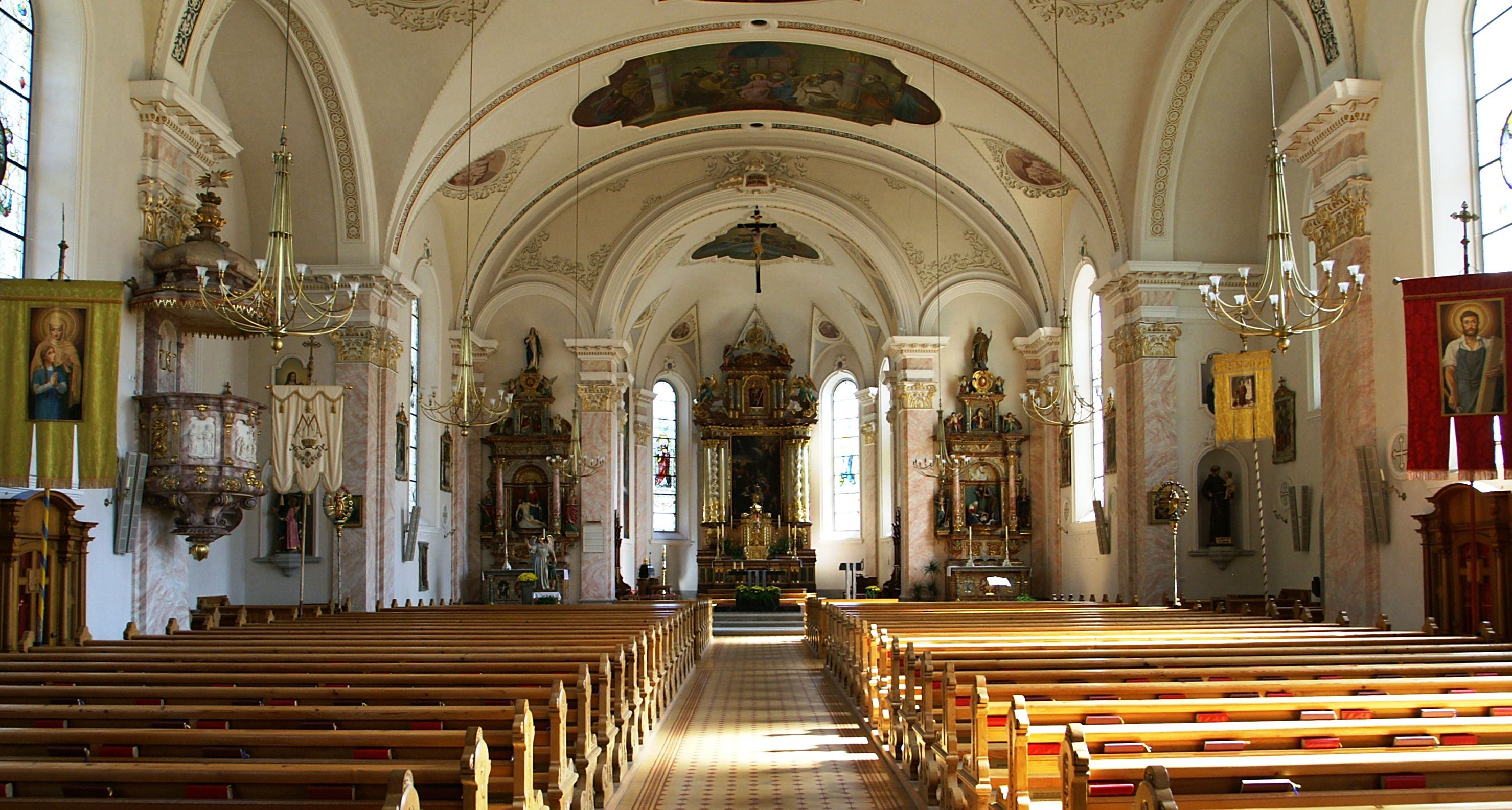 Pfarrkirche St.Jodok 190708 in Bezau